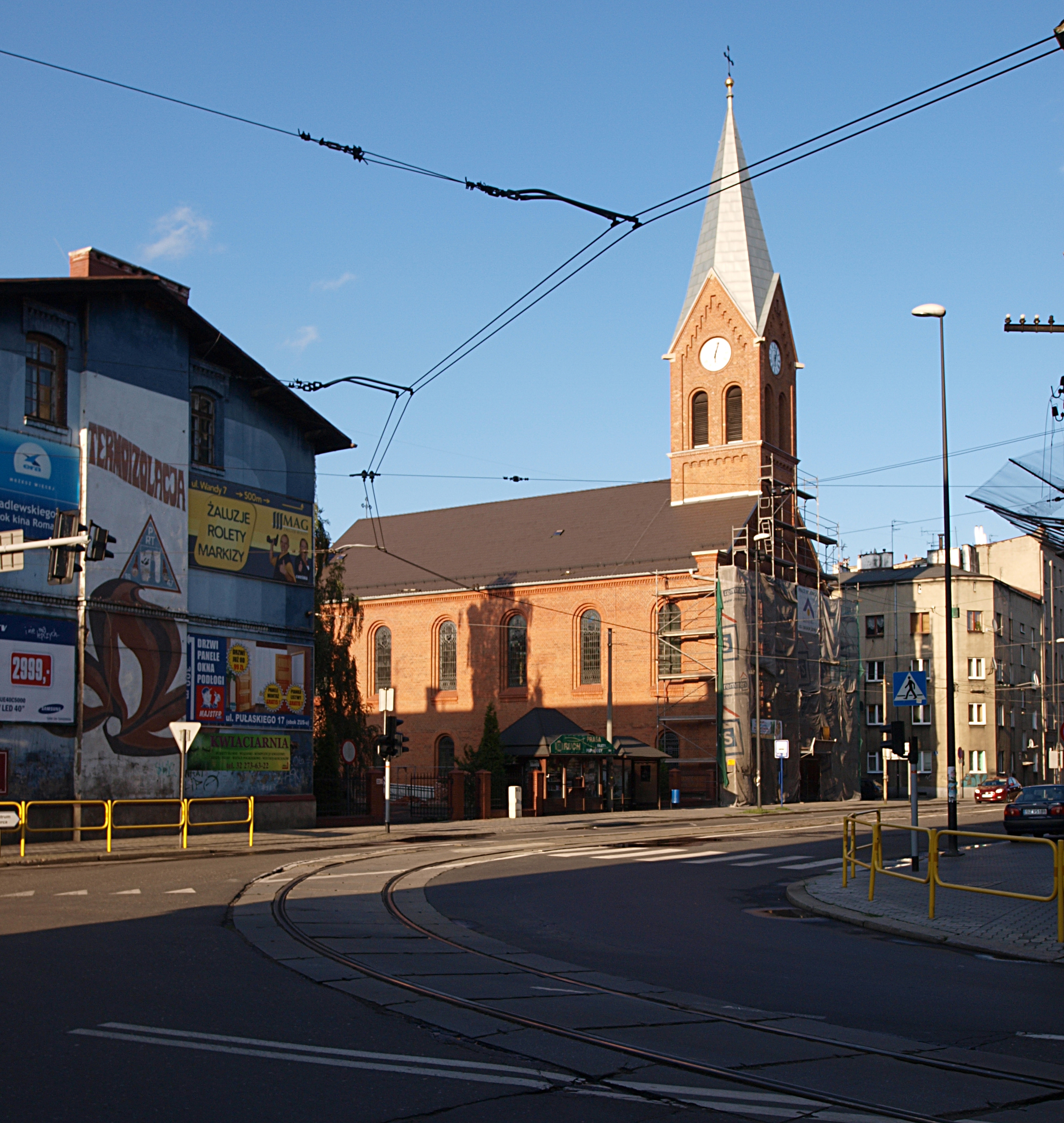 Czyszczenie elewacji Kościoła Pokoju.